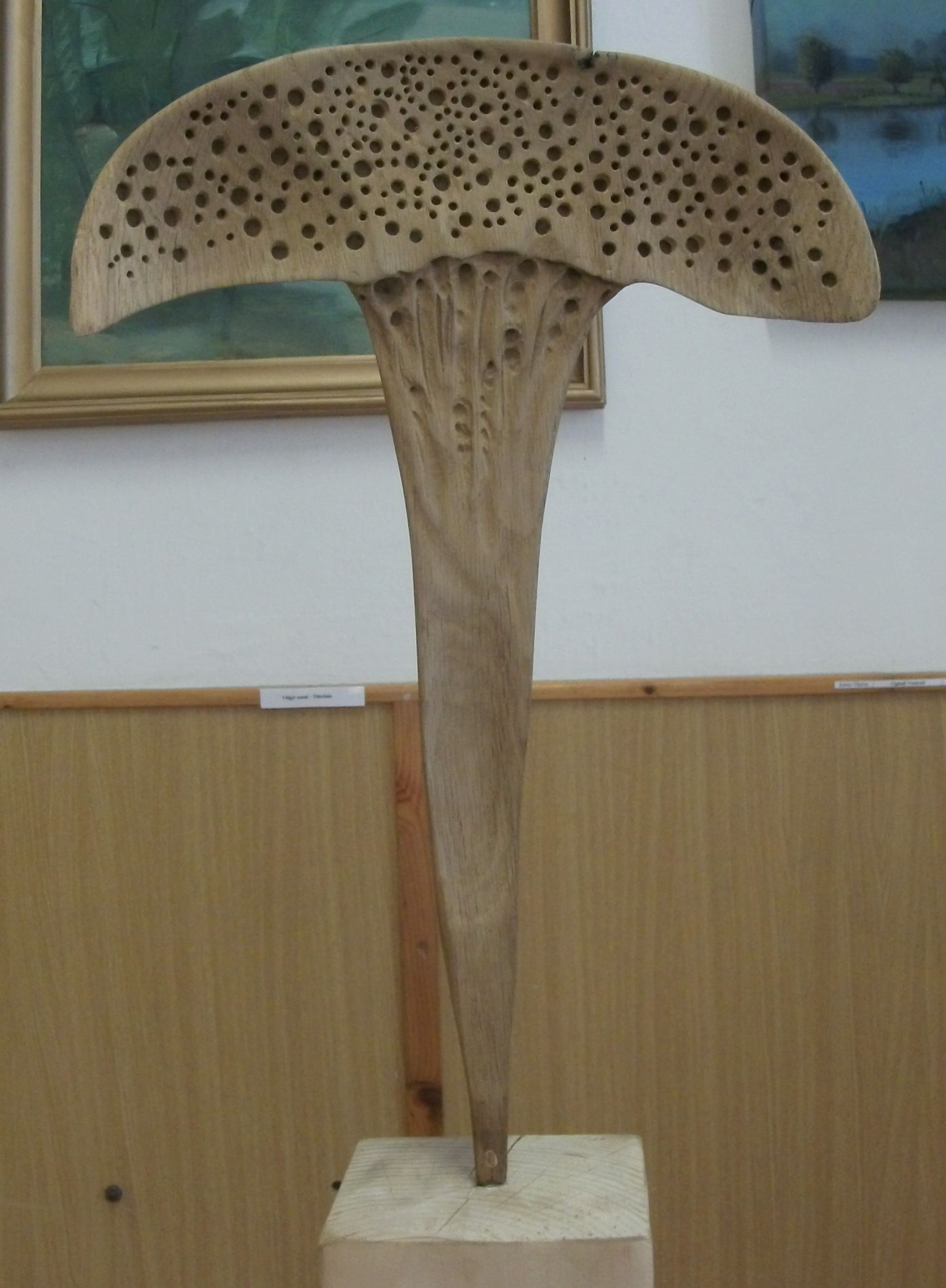 Czigándi Varga Sándor - Hangszer című szobra (2010)